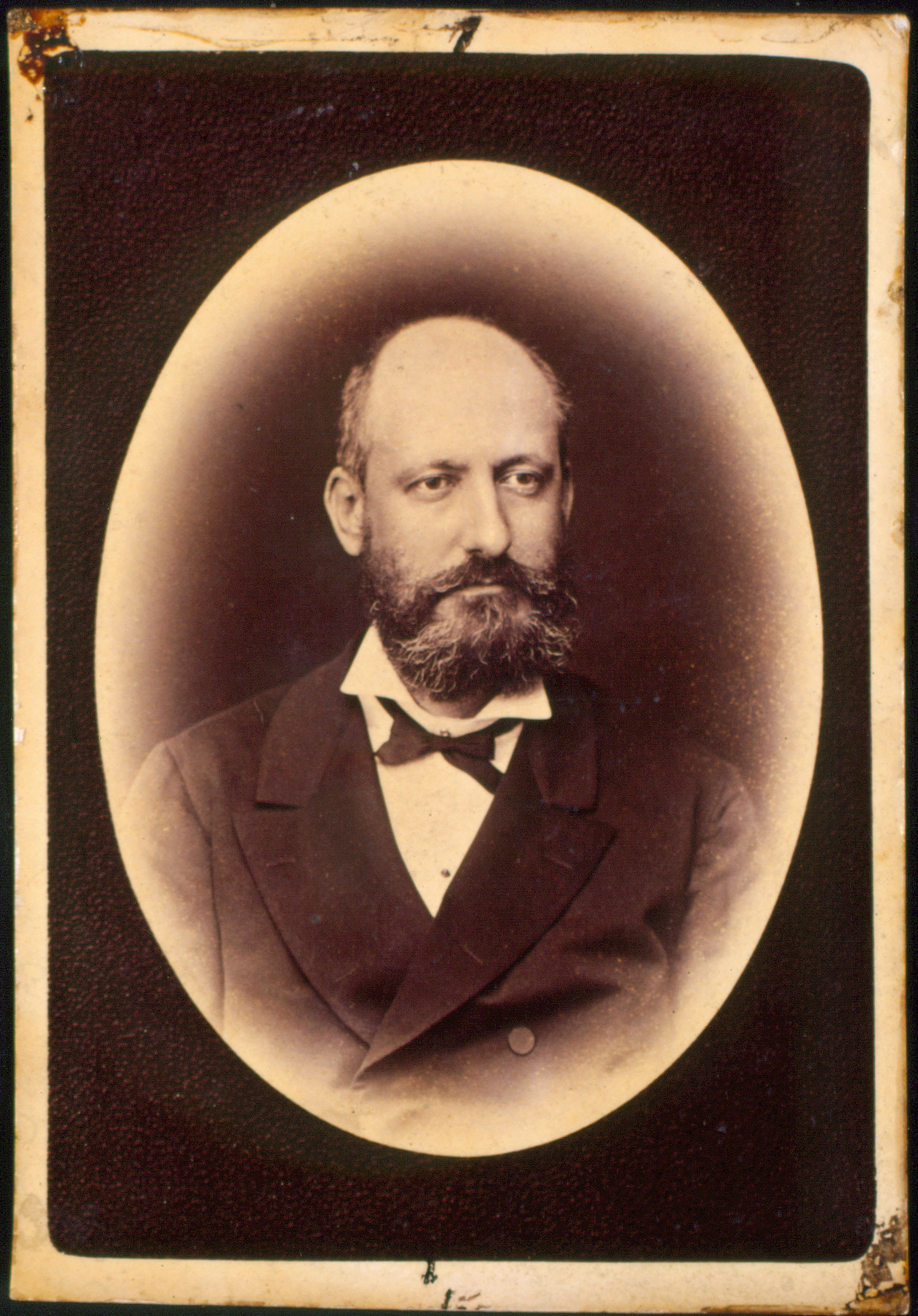 Foto della biblioteca del conservatorio di musica "G.Rossini" di Pesaro